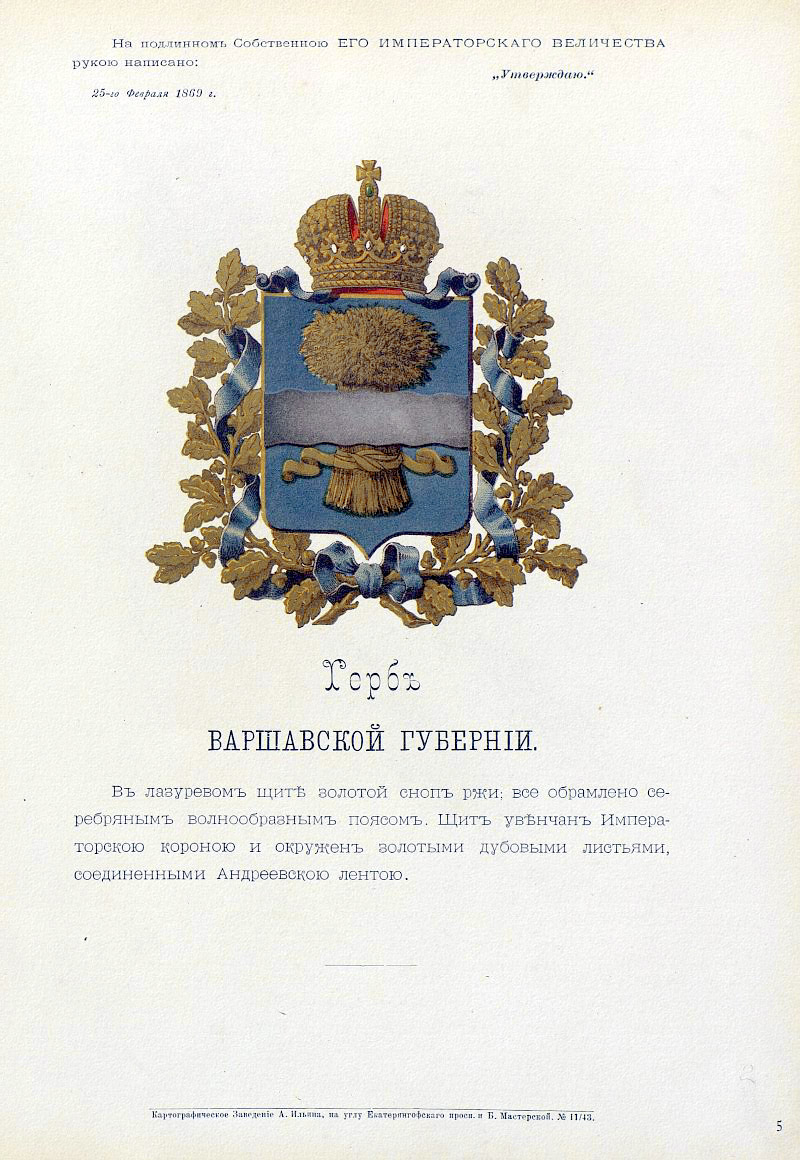 Official Russian Empire coat of arms Varshava Governorate. Герб Российской Империи Варшавская губернии с официальным описанием в в Гербовнике Министерства внутренних дел Российской Империи 1880 года. Утверждён Императором Всероссийским Александром Вторым.